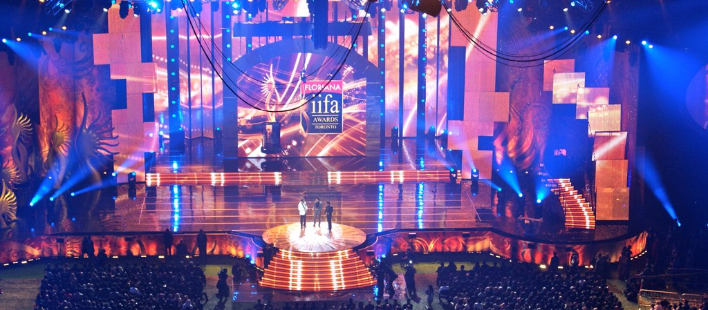 IIFA